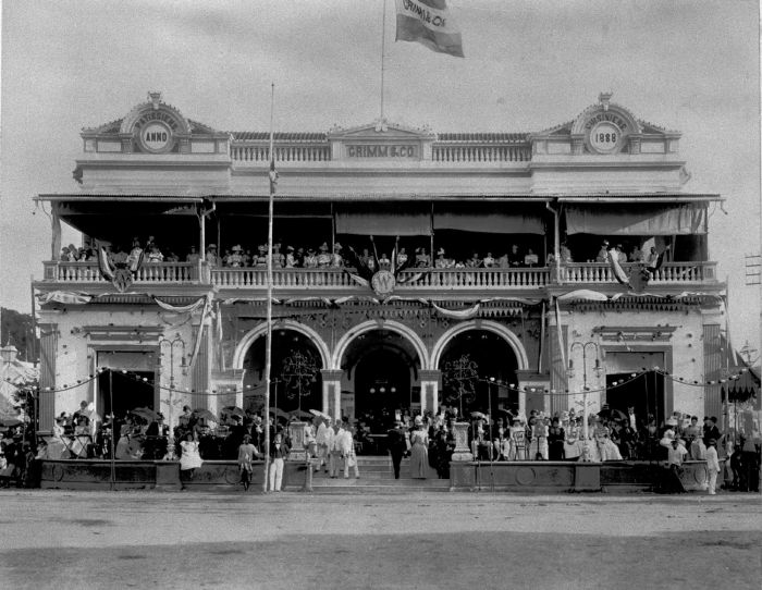 Foto. Toeschouwers zitten op het bordes van patisserie Grimm & Co. in Soerabaja te wachten op de optocht ter gelegenheid van de kroningsfeesten van Koningin Wilhelmina in 1898.